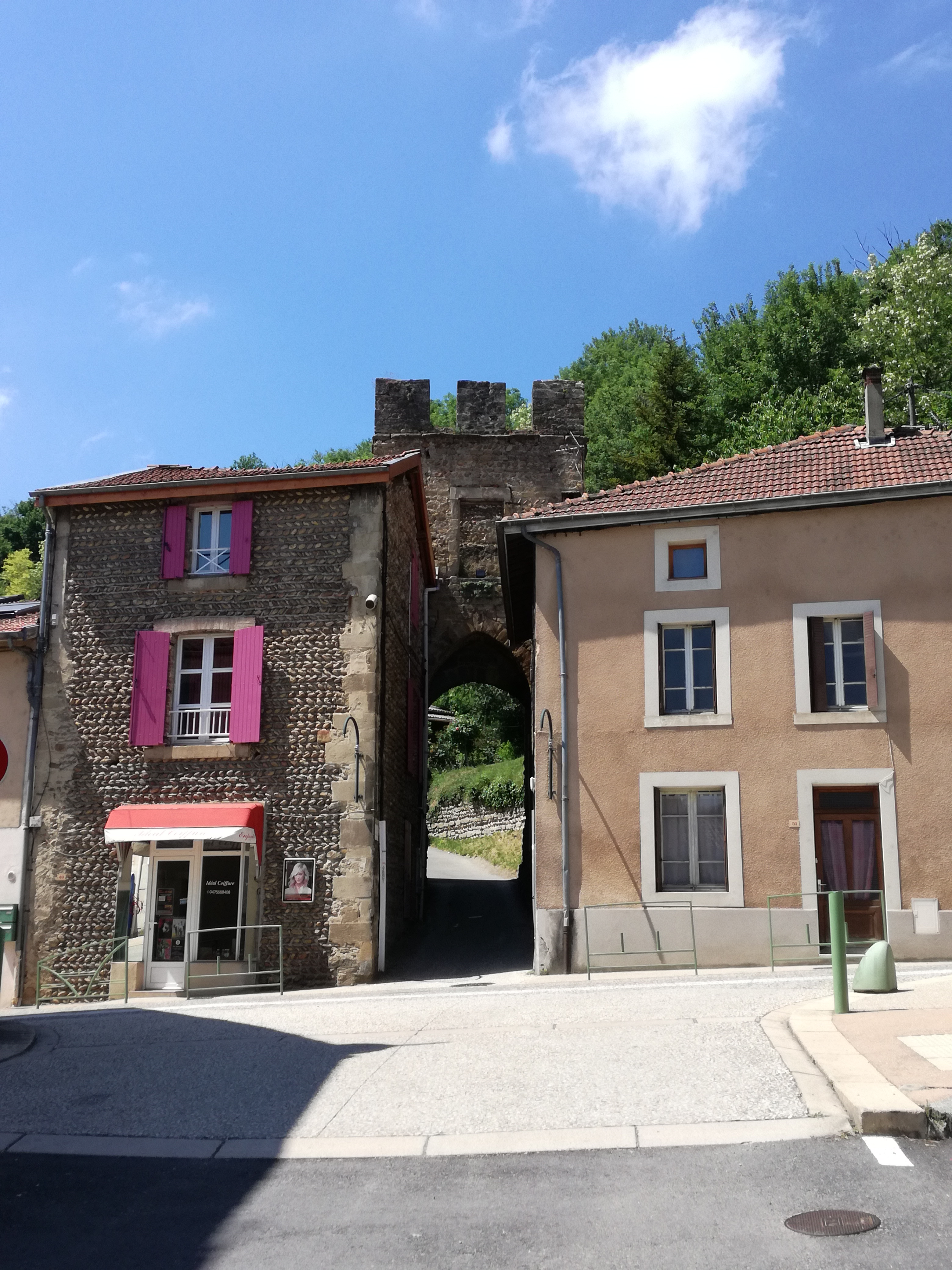 Porte principale du château féodal . Hauterives, Drôme, France.